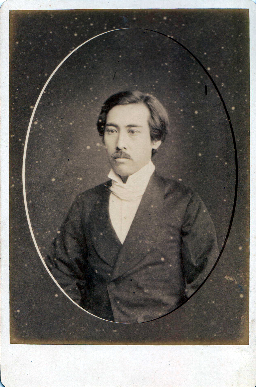 矢野竜渓